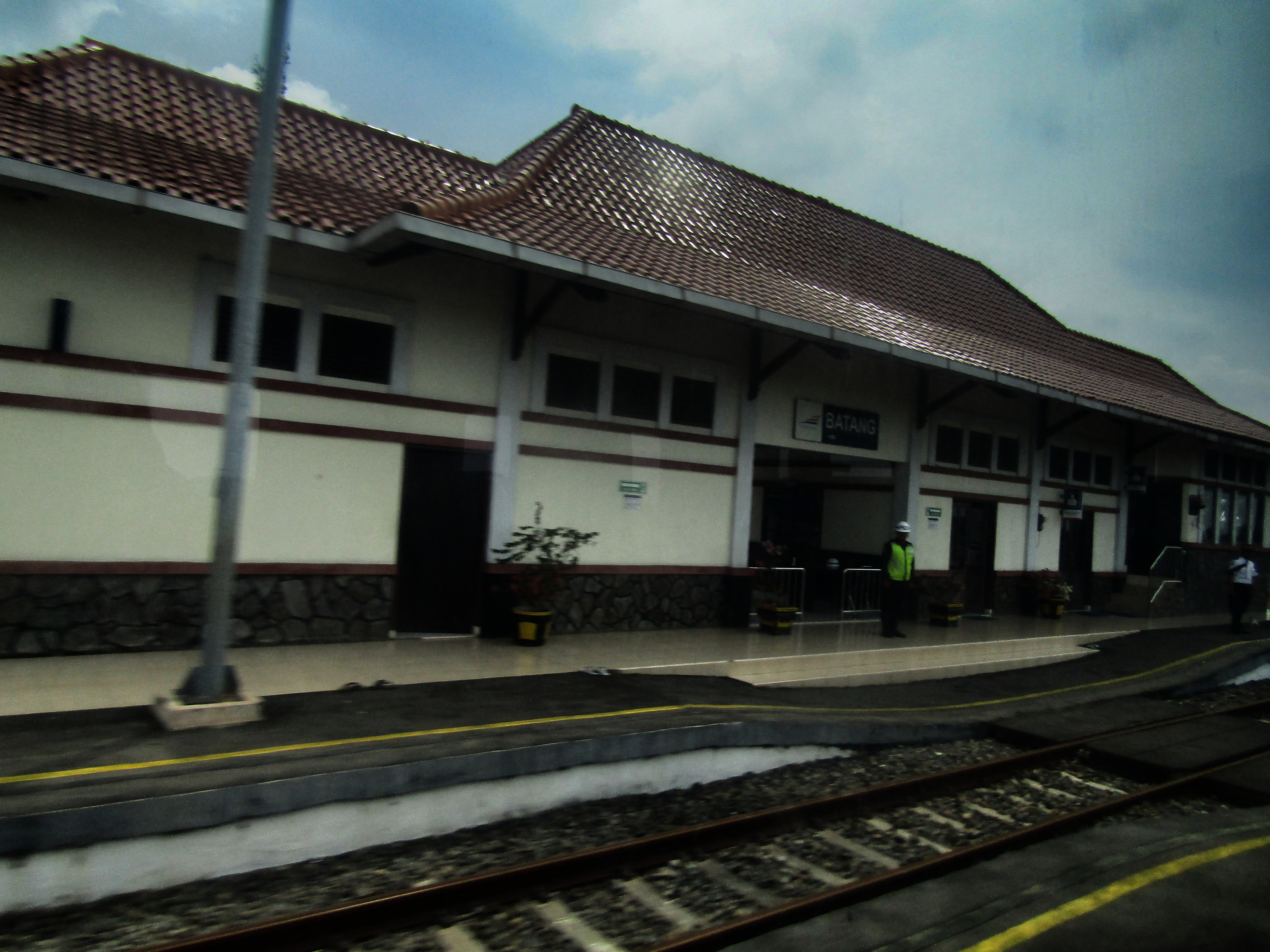 Stasiun Batang Baru, 2019